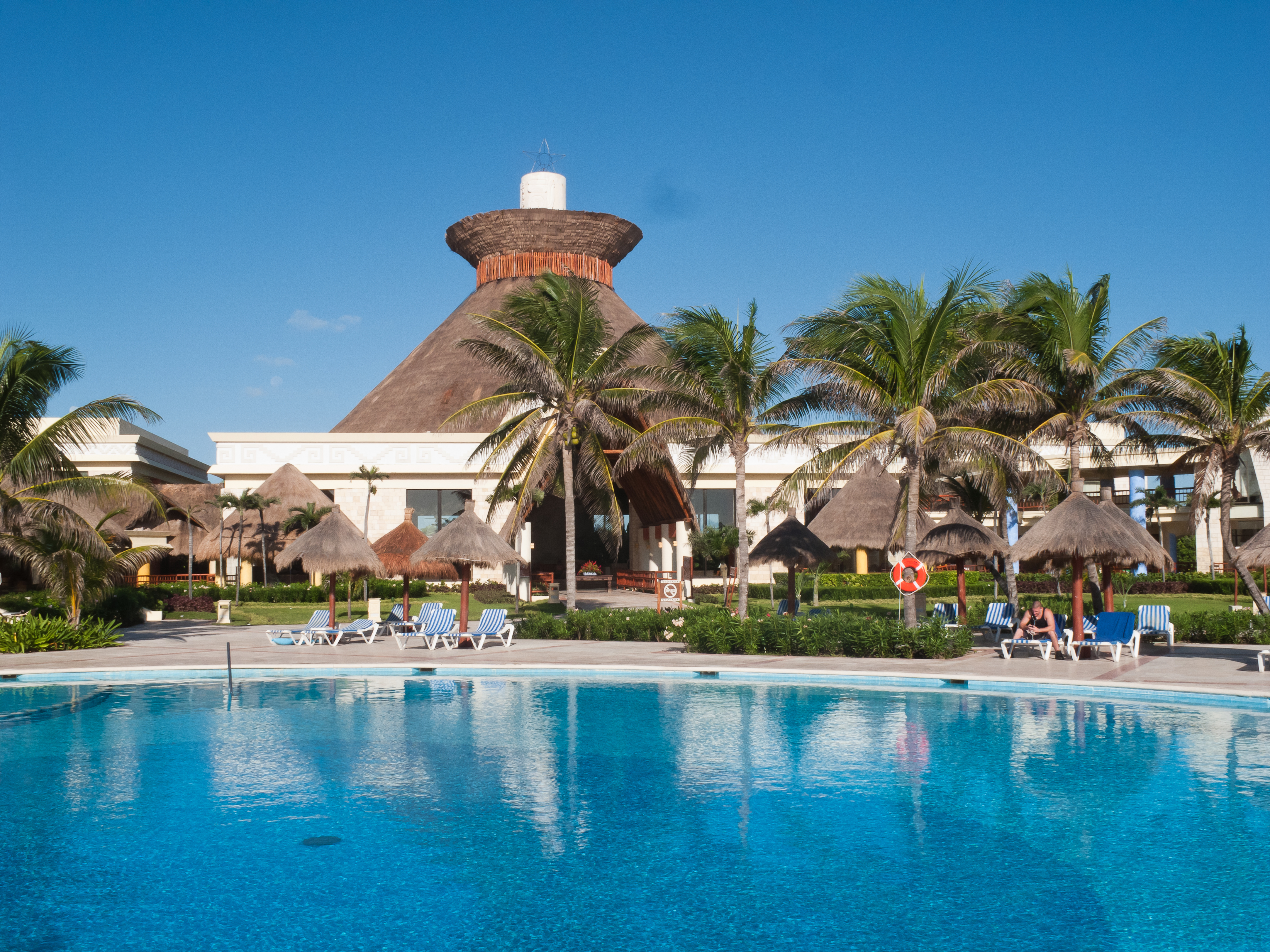 Hotel Bahía Príncipe Tulum, próximo a Chacumal, na Estrada federal 307 a 100 km de Cancún